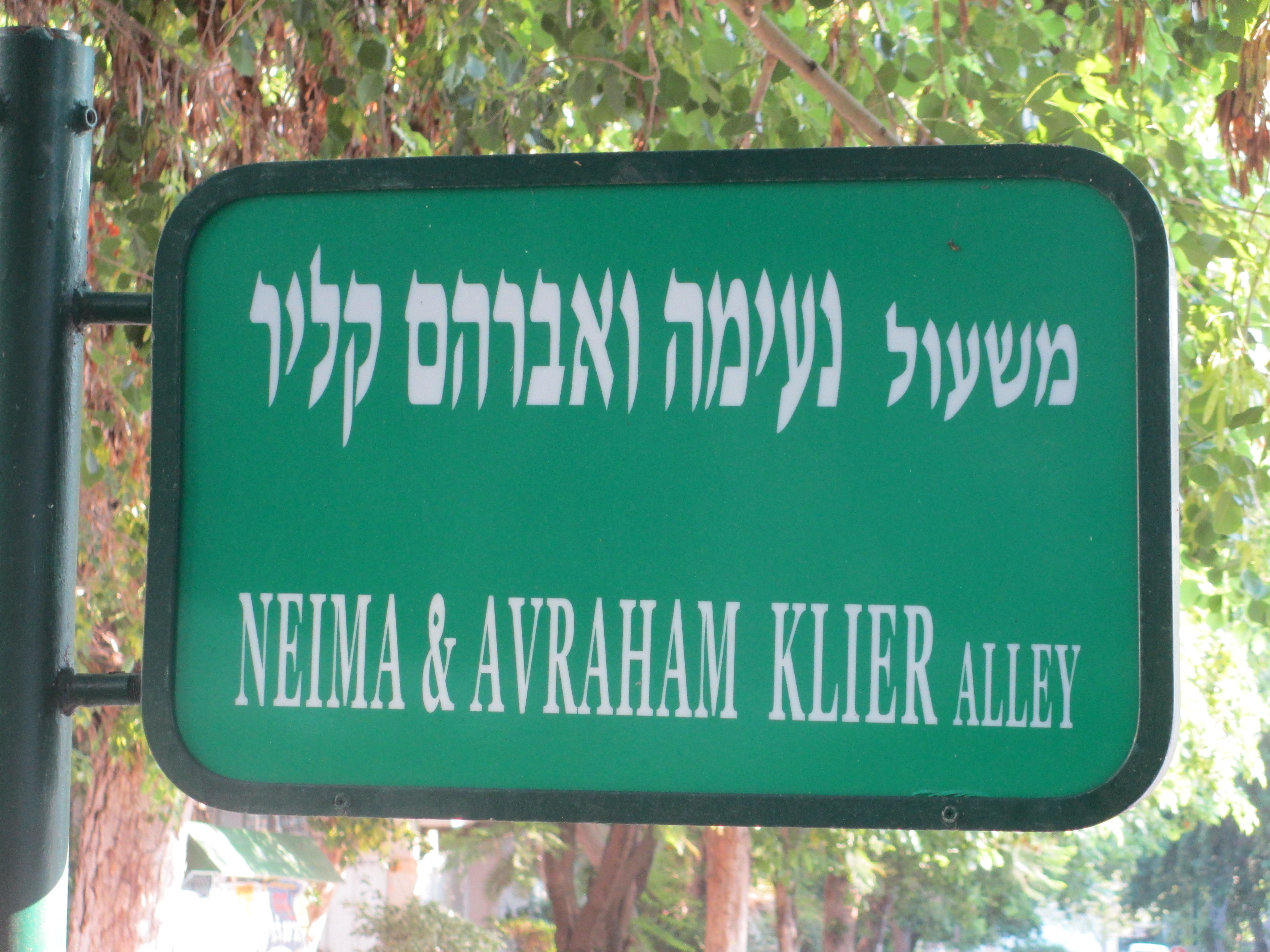 משעול נעימה ואברהם קליר ברמת גן